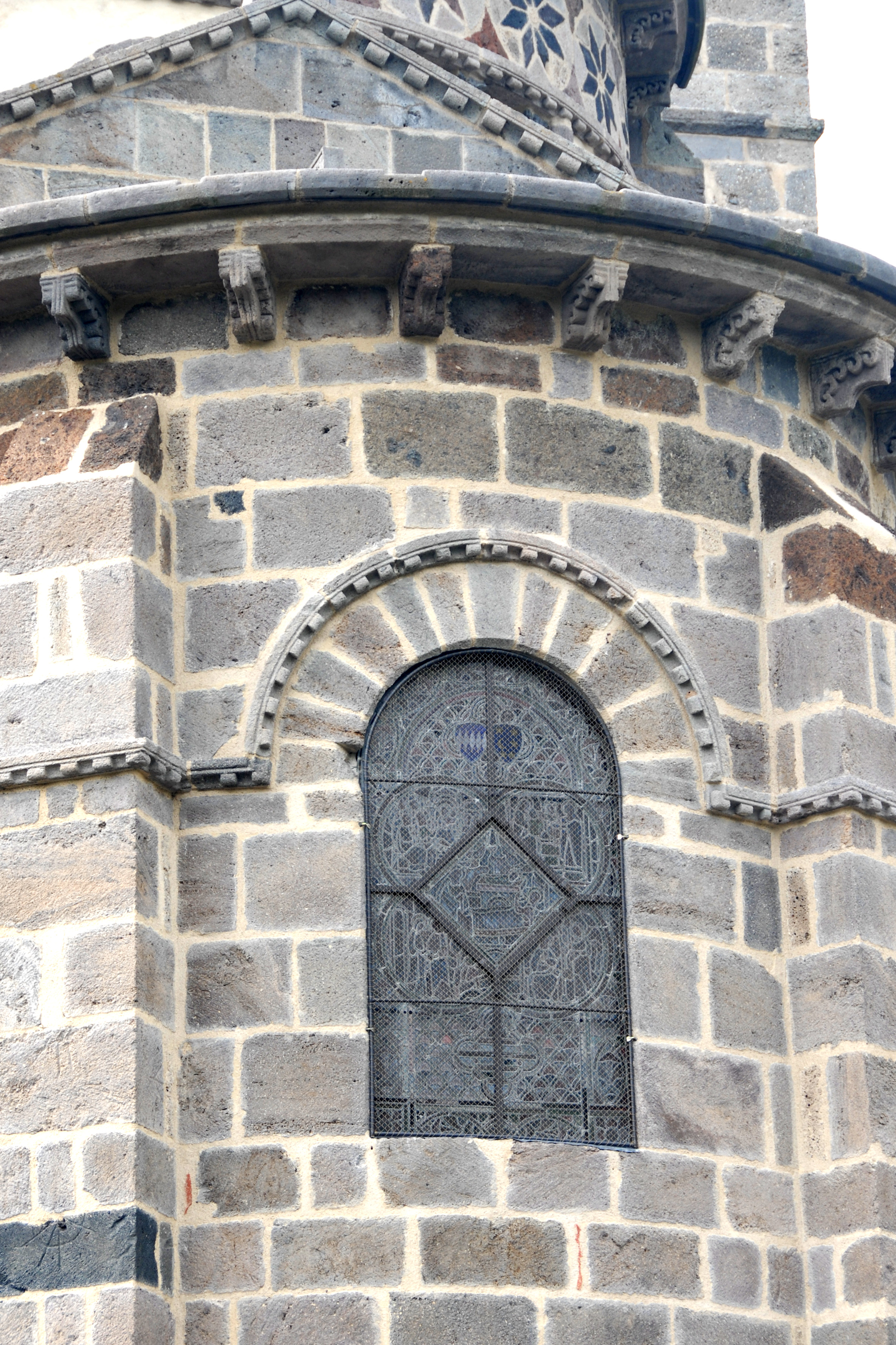 St.-Nectaire, Fenster, zentrale Umgangskapelle